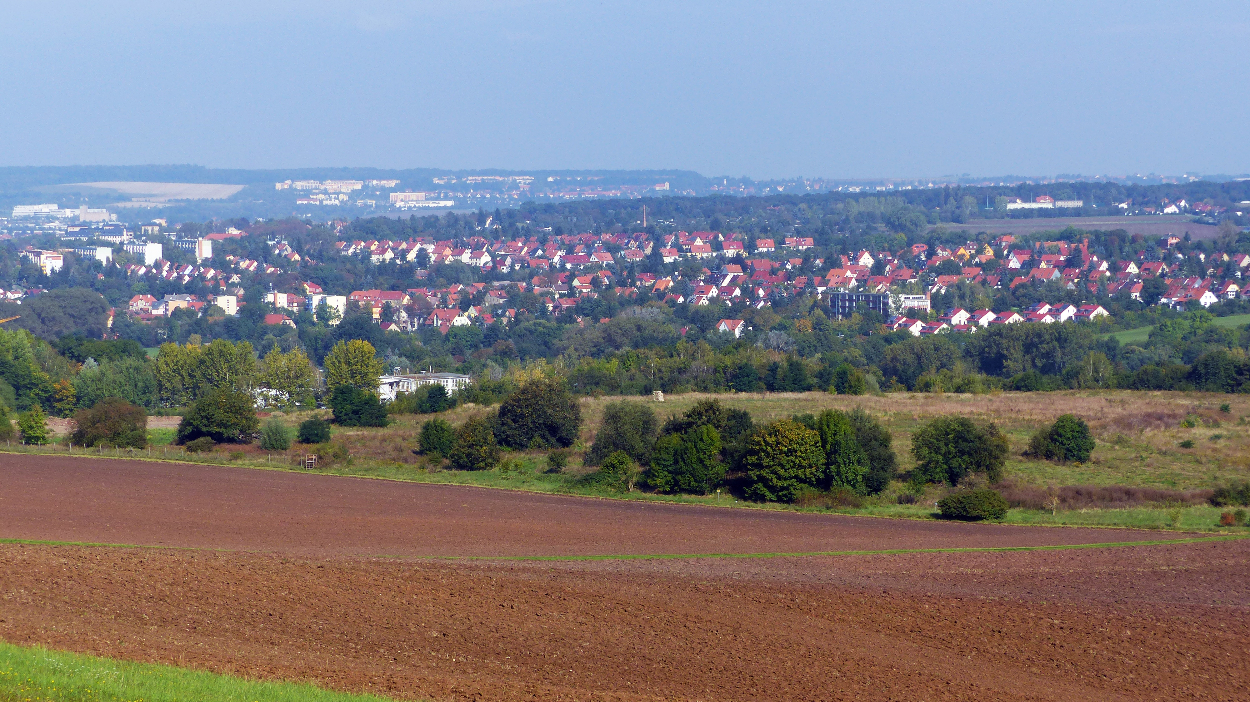 Blick auf Oberweimar vom Schloss Belvedere aus